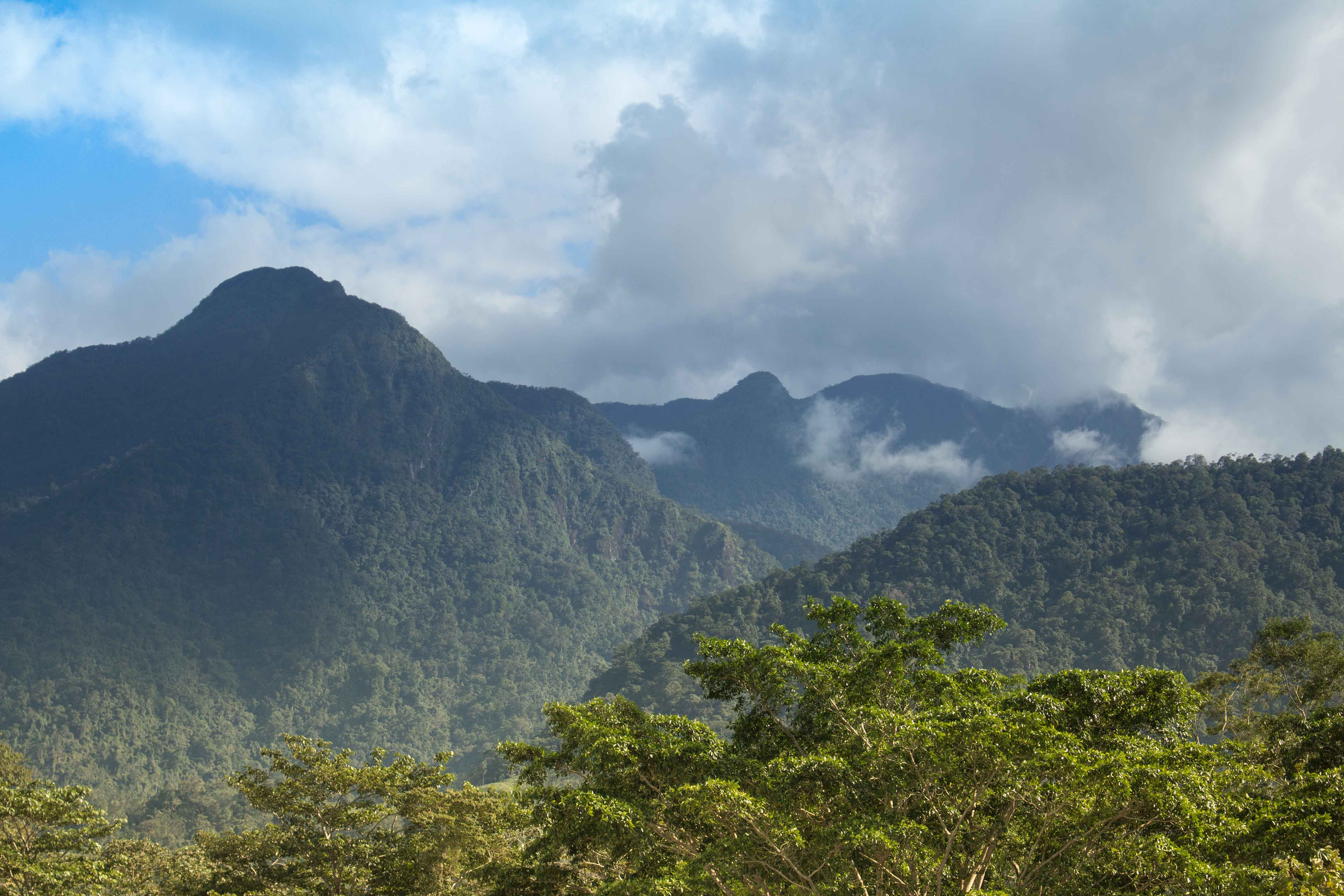 Honduras